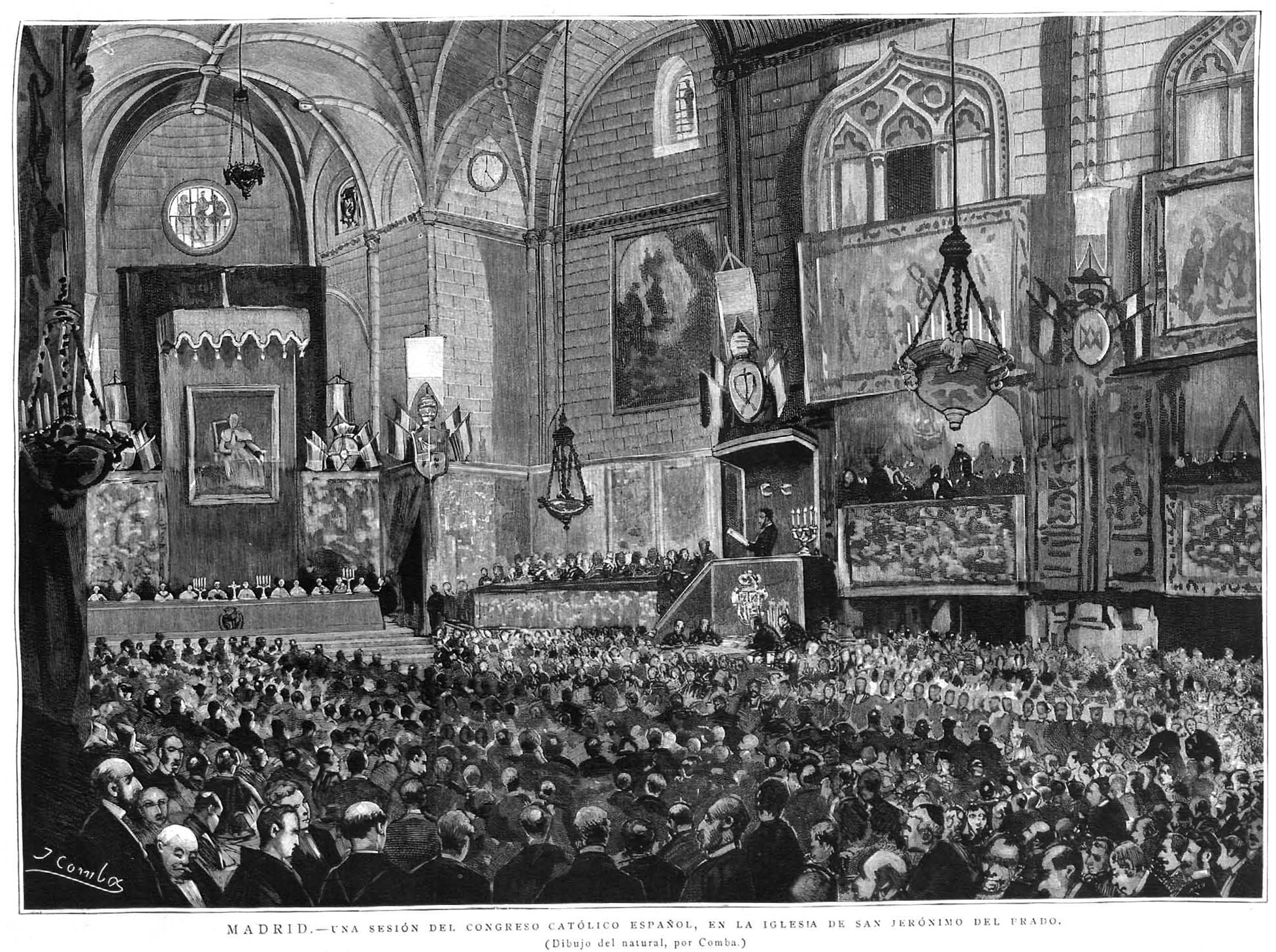 Madrid, una sesión del Congreso Católico Español, en la iglesia de San Jerónimo del Prado, en la revista española La Ilustración Española y Americana.